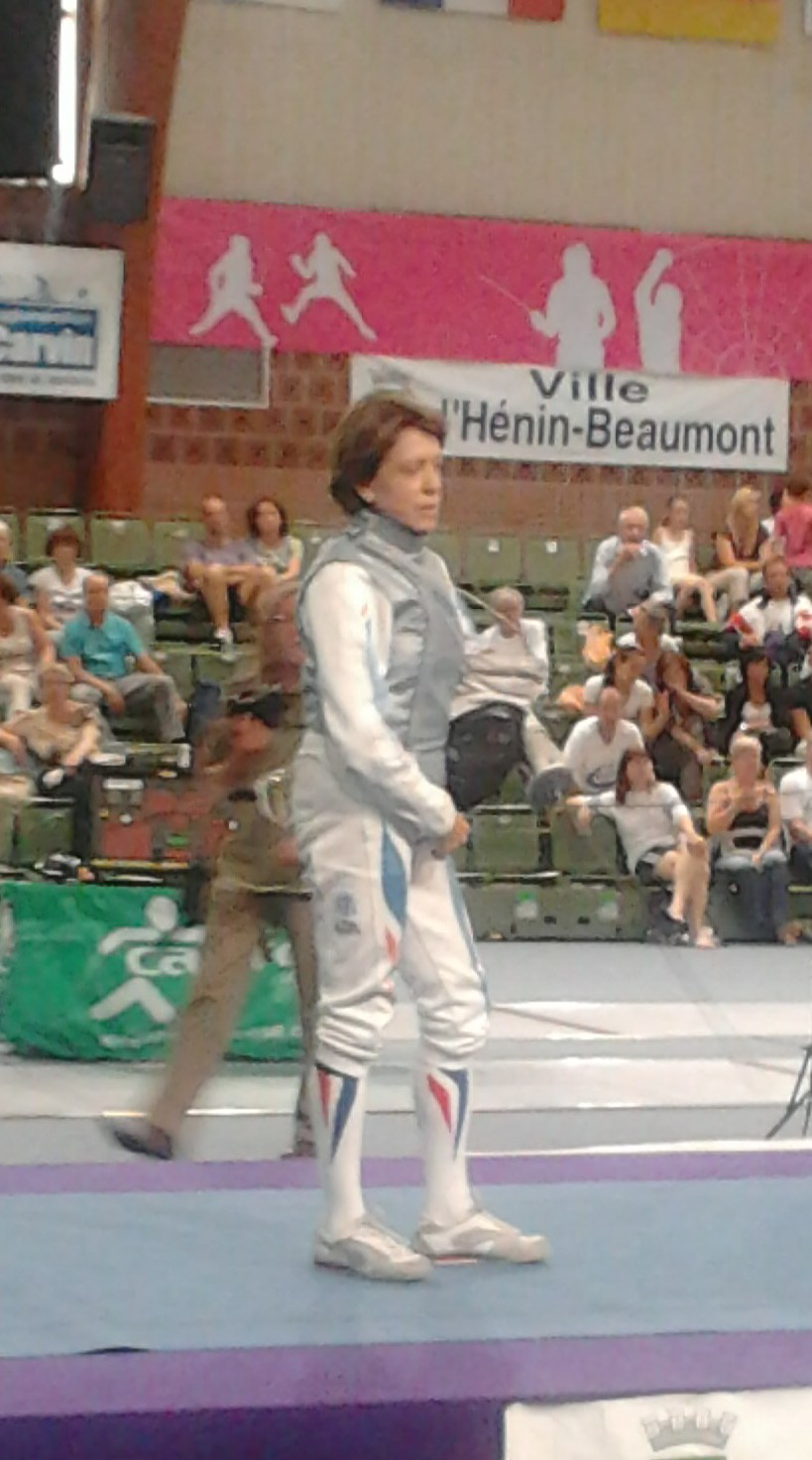 Photo de Marie-Chantal Demaille lors des championnat d'Europe d'escrime vétéran 2011